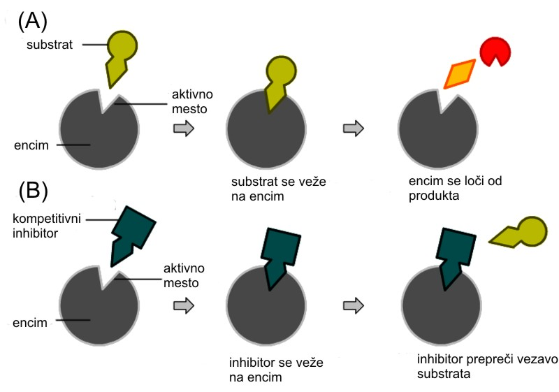 Shematični prikaz normalne katalize substrata (A) ter kompetitivne inhibicije encima (B).